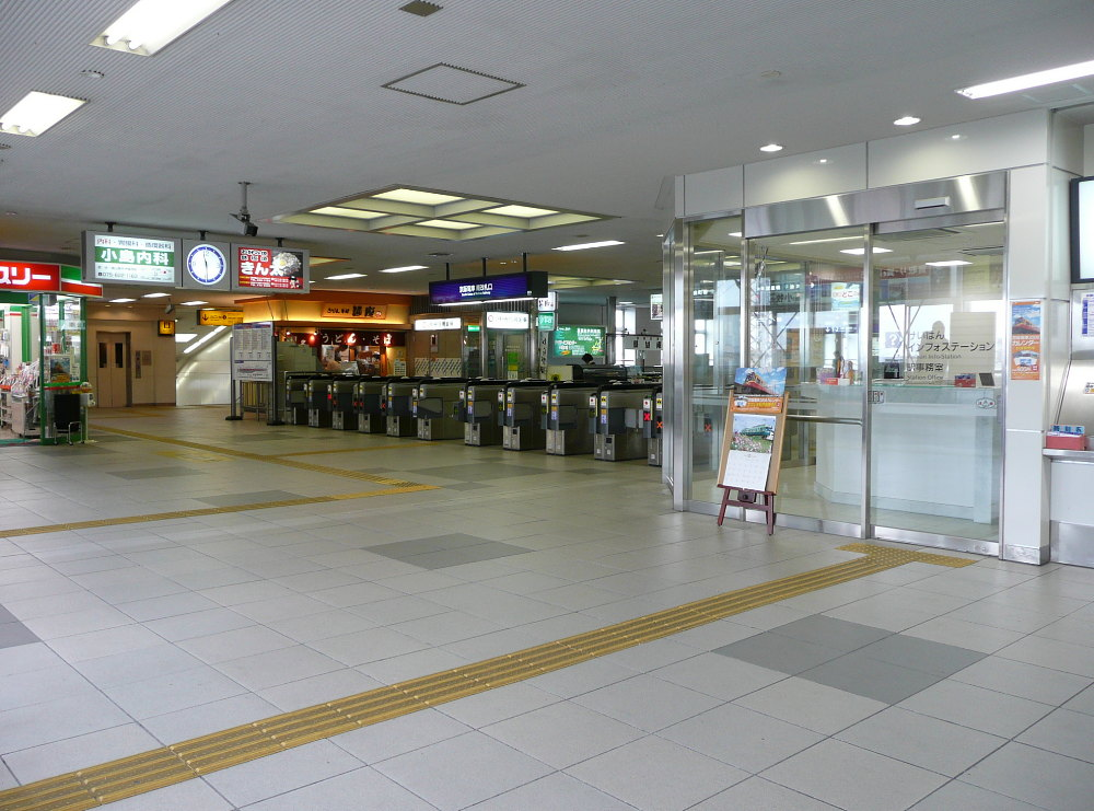 京阪電気鉄道京阪本線丹波橋駅南口改札口 投稿者↑PON（ウエポン）が2007年10月14日に撮影